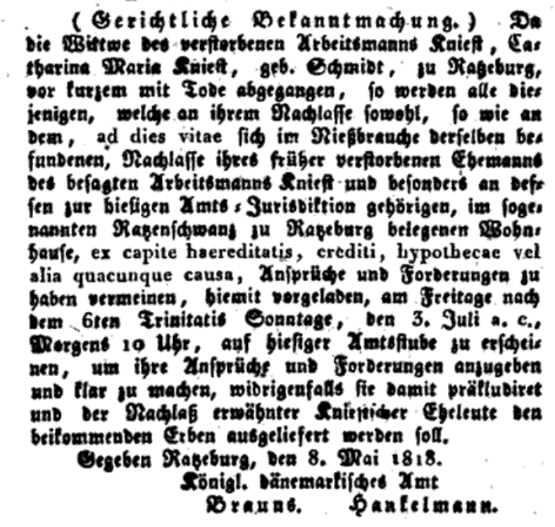 Nachlassverwaltung Catharina Kniest durch Amtmann Brauns, Ratzeburg 1818